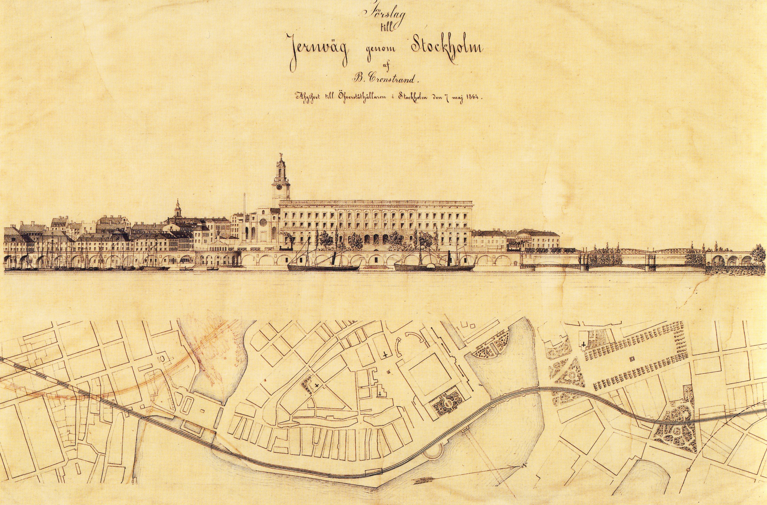 Baltzar Cronstrands förslag till dragning av sammanbindningsbanan genom Gamla stan.